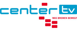 neues Logo von center.tv Bremen/Bremerhaven